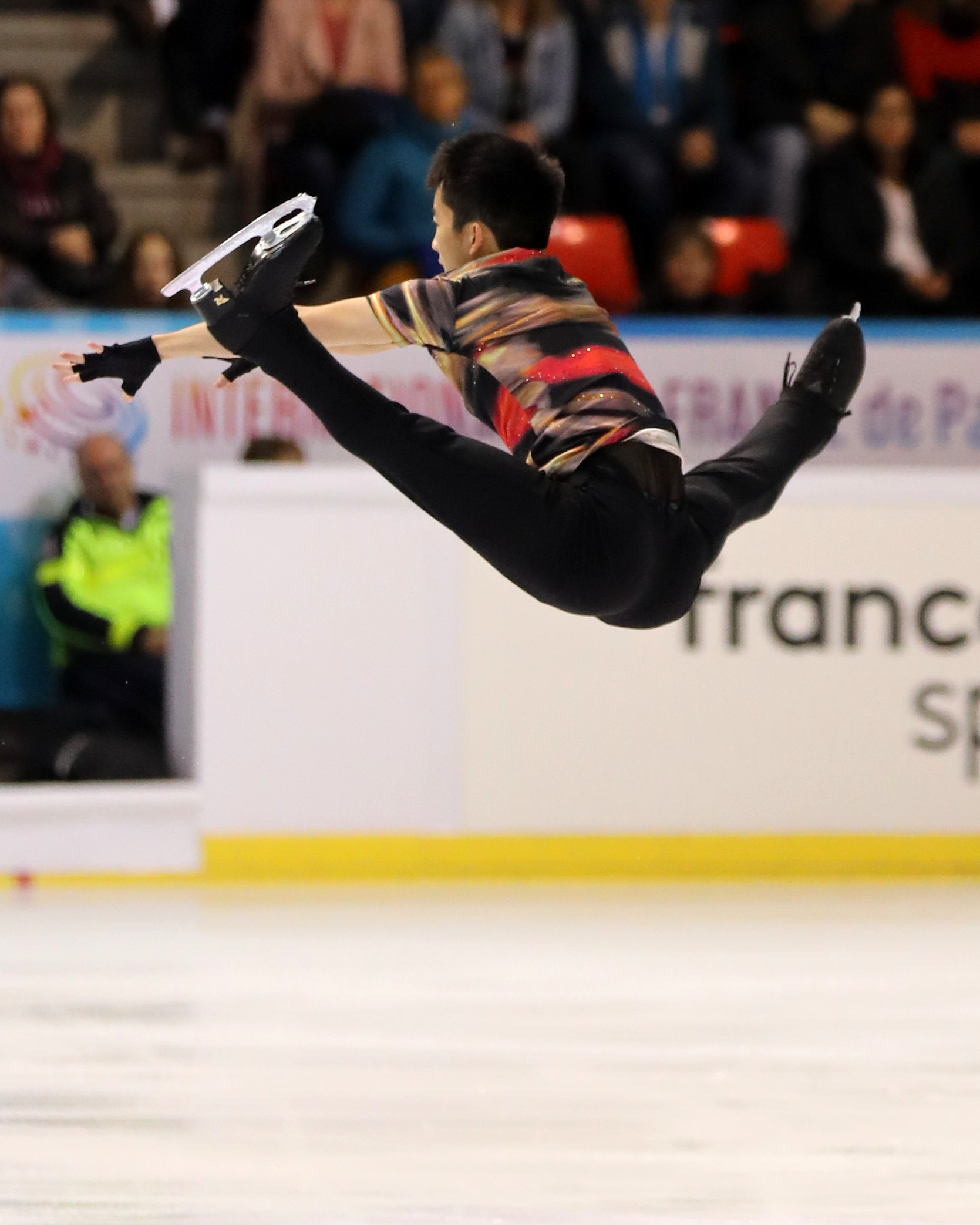 Tomoki Hiwatashi, programme court aux Internationaux de France 2019.